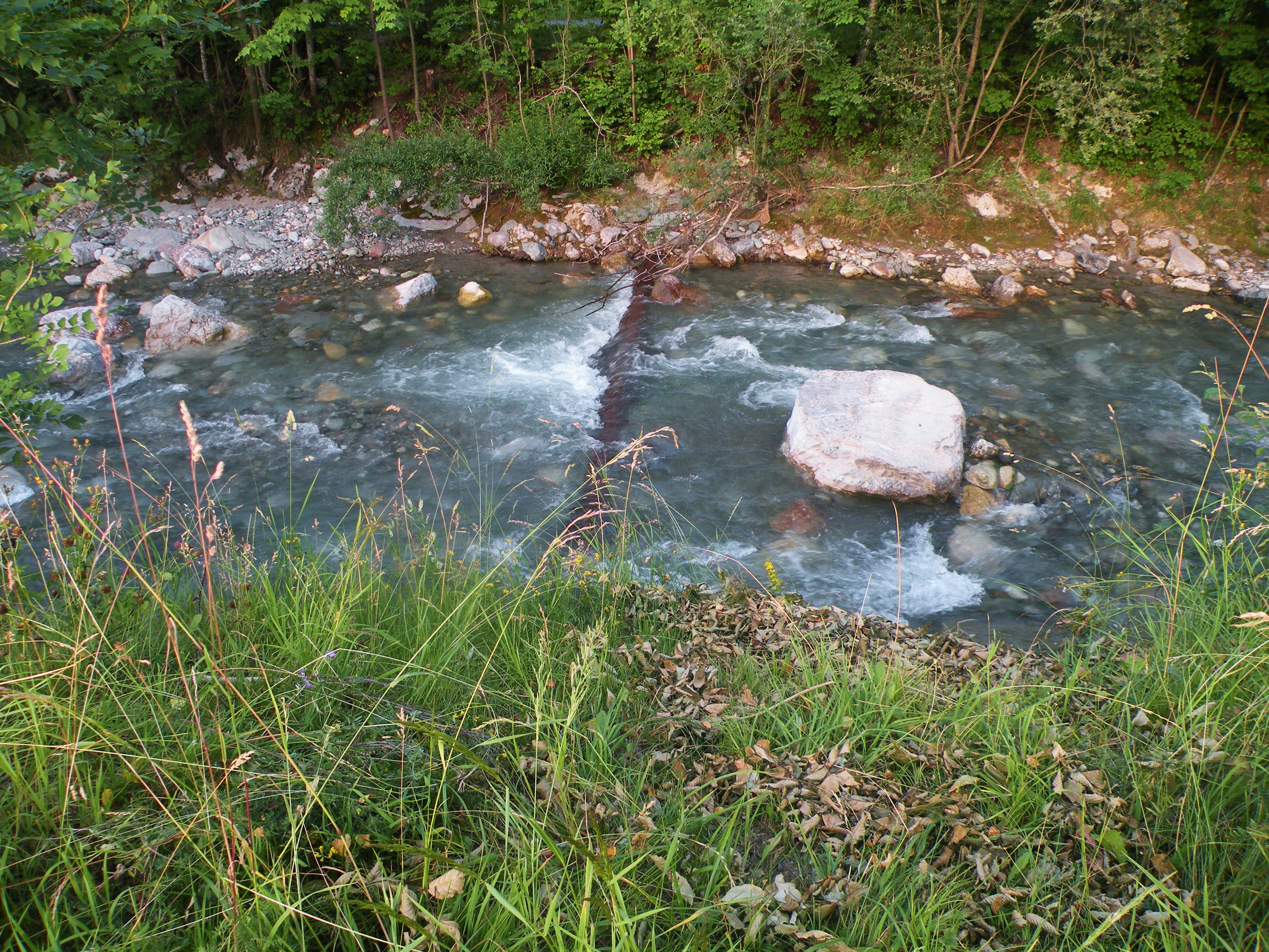 Snelstromend riviertje de Aschauer Ache, Stroomt van zuid naar noord door Kirchberg in Tirol